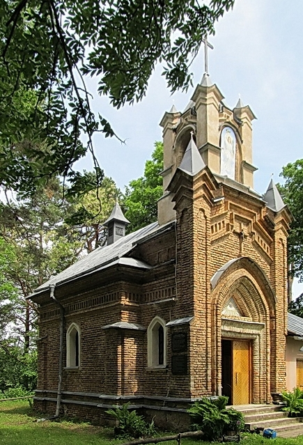 Дзеравянчыцы. Капліца-пахавальня